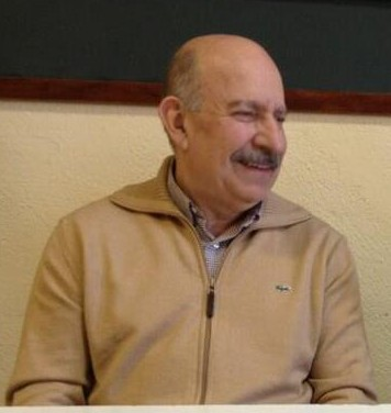 Josep Guia, històric dirigent del partit independentista